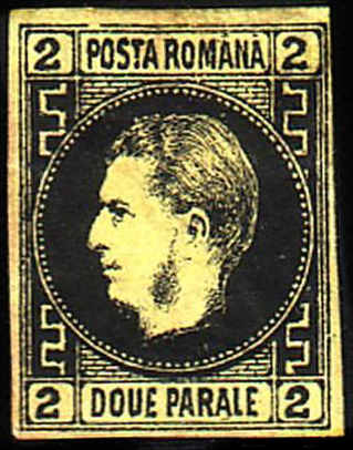 Почтовая марка Объединённого княжества Валахии и Молдавии (Румынии), князь Кароль I